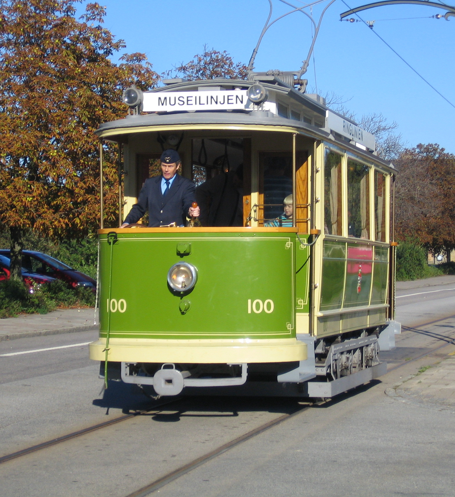 Museispårvagn nr 100, Malmö, Sweden.